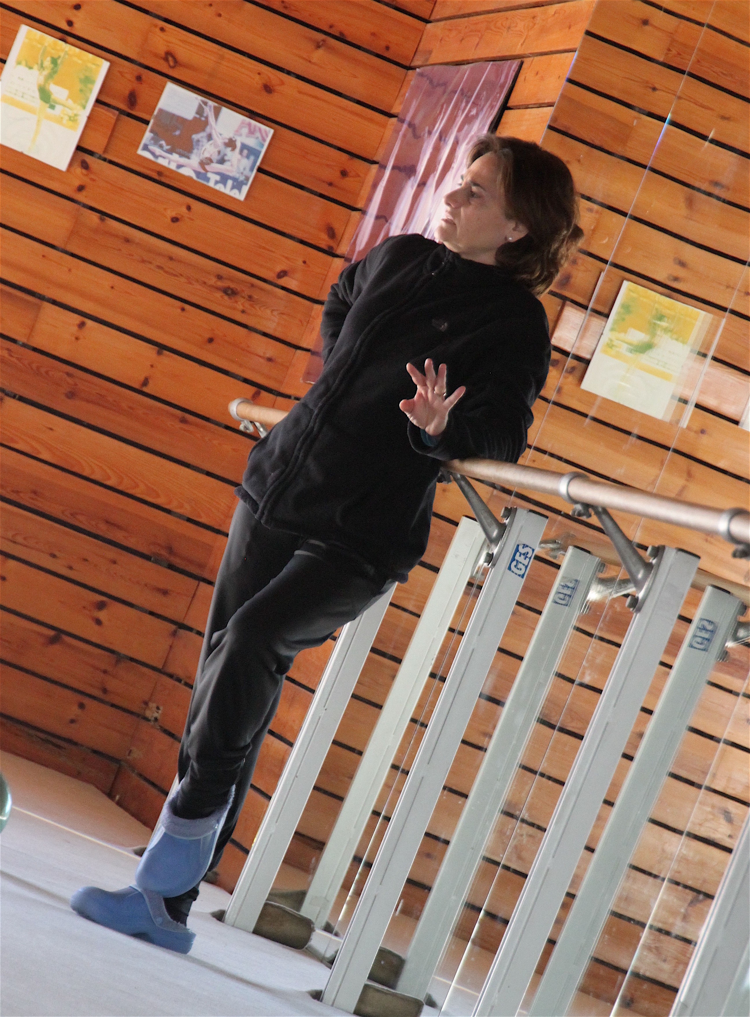 Iratxe Aurrekoetxea en el CAR de San Cugat en diciembre de 2016.